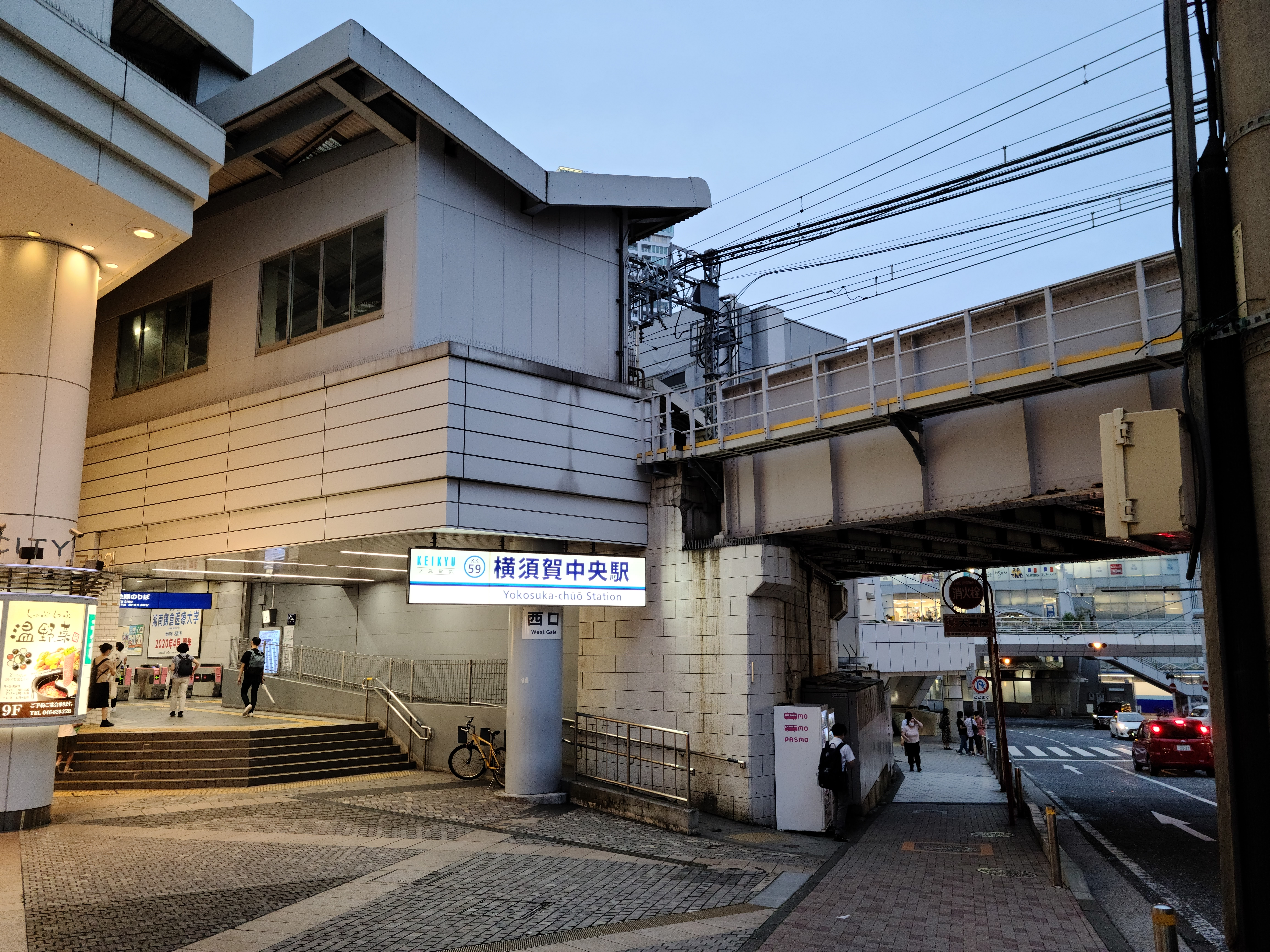 横須賀中央駅の西口です。